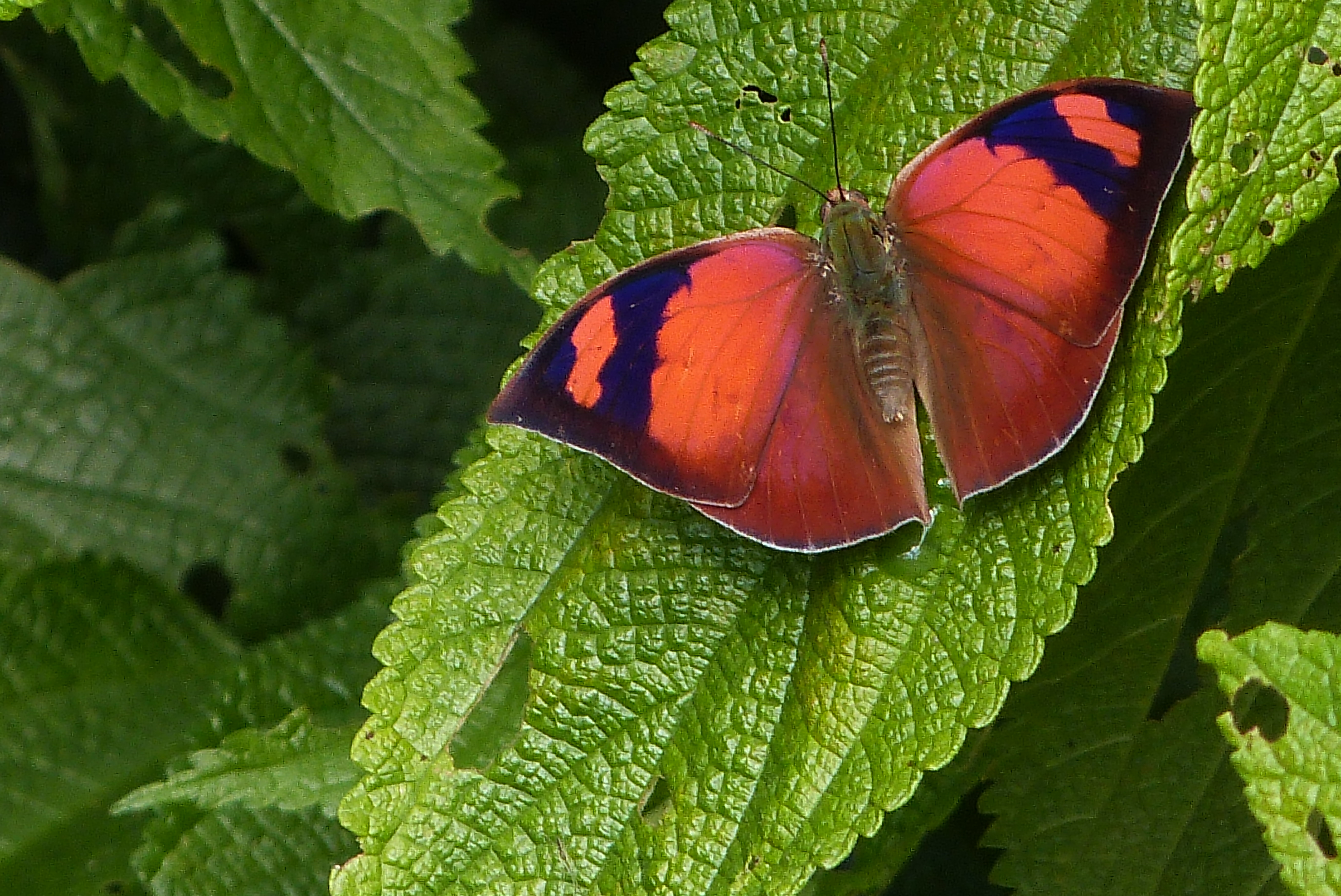 Foto tirada em Mairiporã - SP